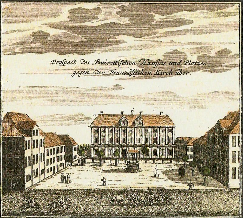 Erlangen, Buirettesches Palais am Hugenottenplatz. Randbild aus dem Homannschen Stadtplan.